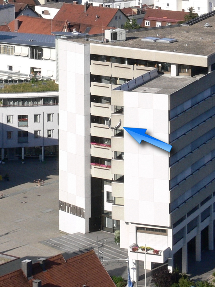 Heidenheim an der Brenz Rathaus, Blick von Schloss Hellenstein